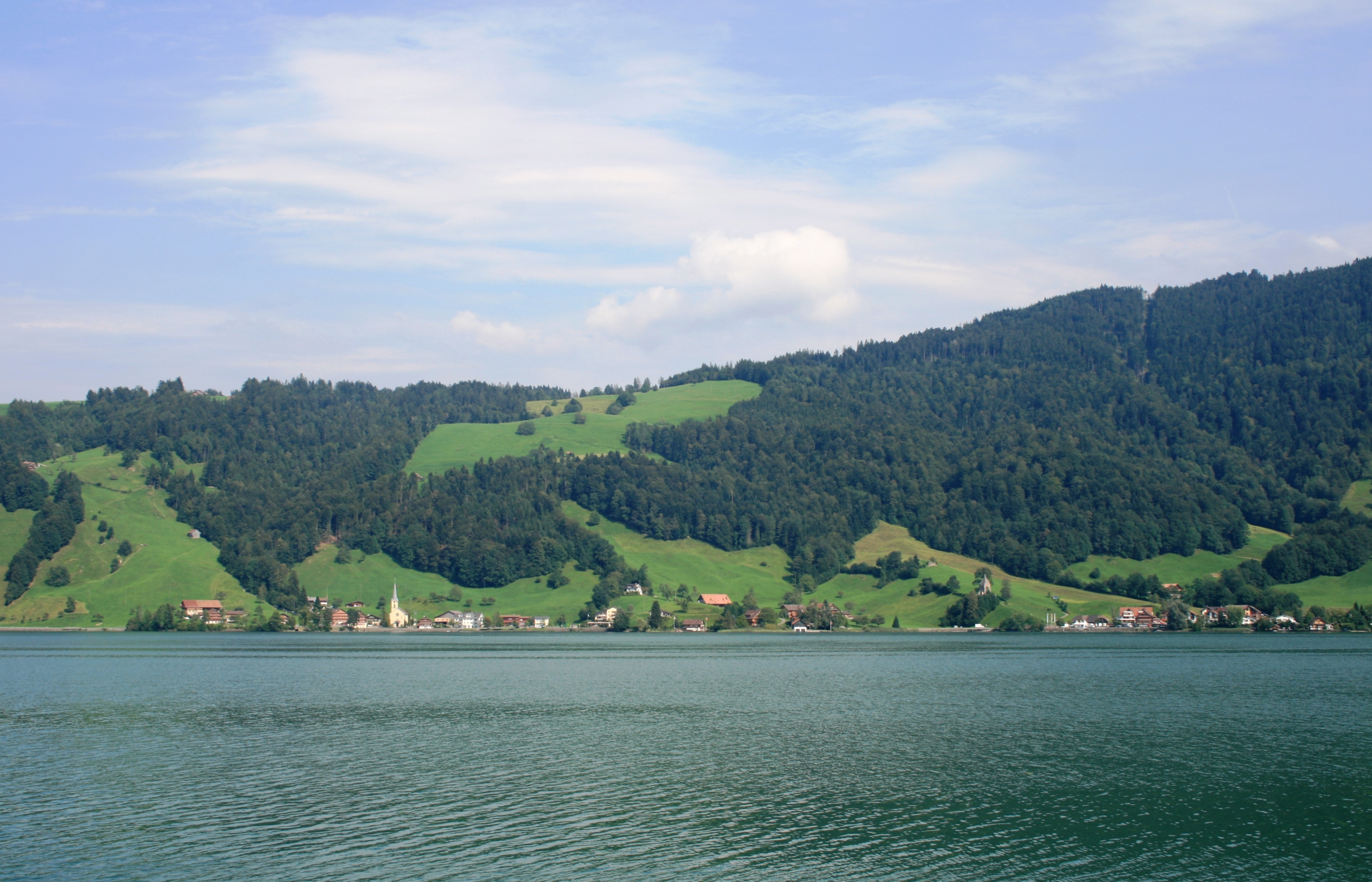 Morgarten, Oberägeri ZG, Schweiz